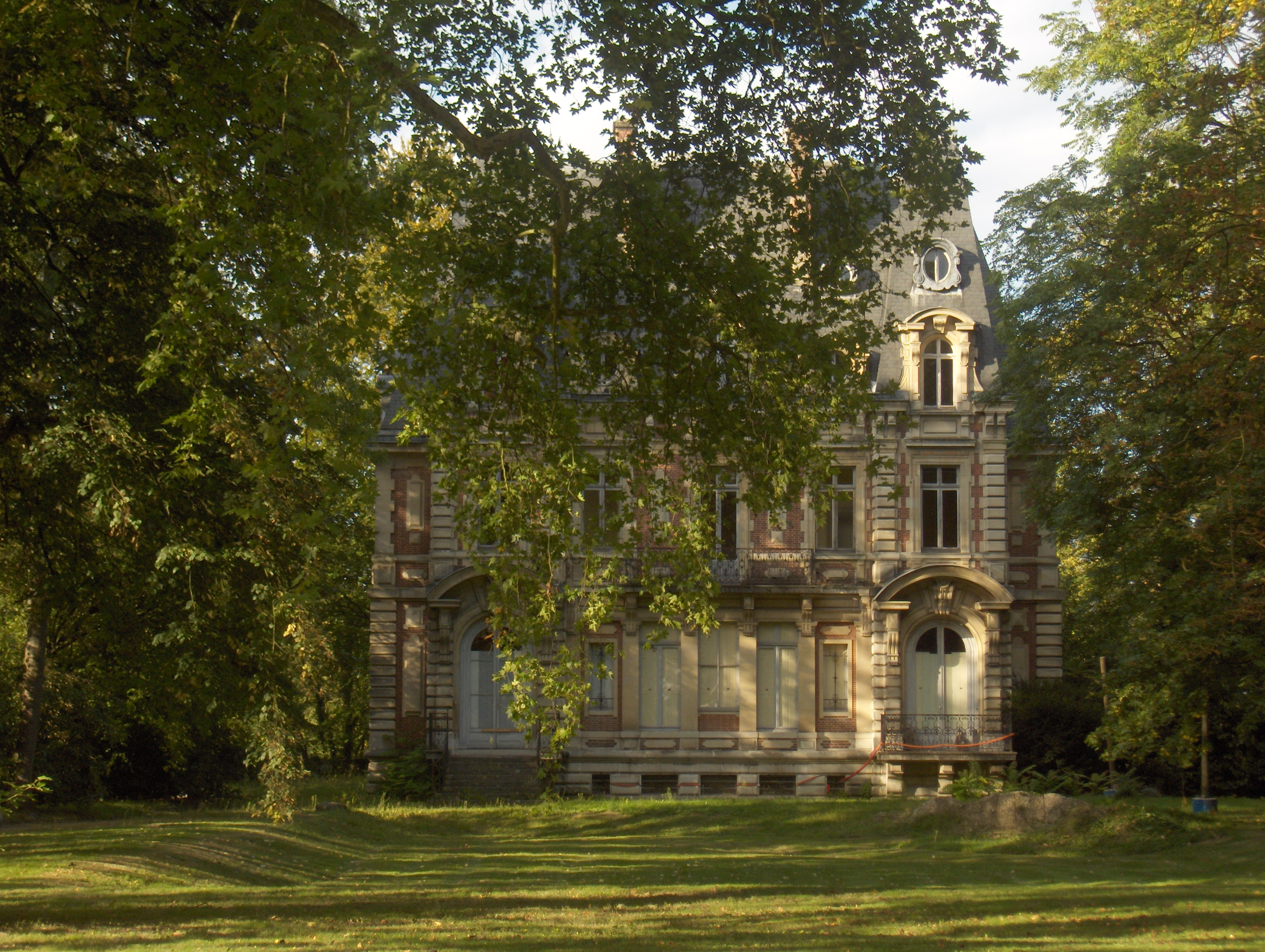 Le château Conti à L'Isle-Adam (Val-d'Oise)